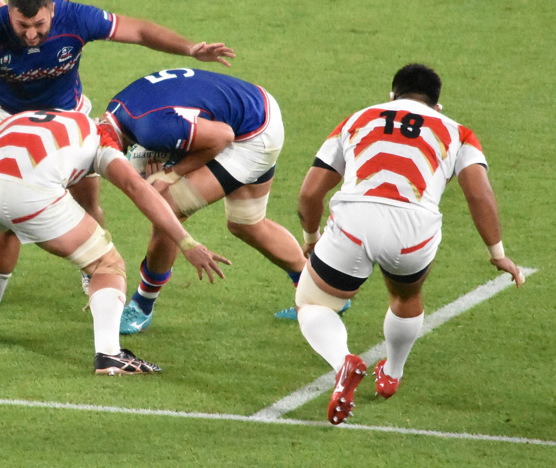 グ・ジウォン